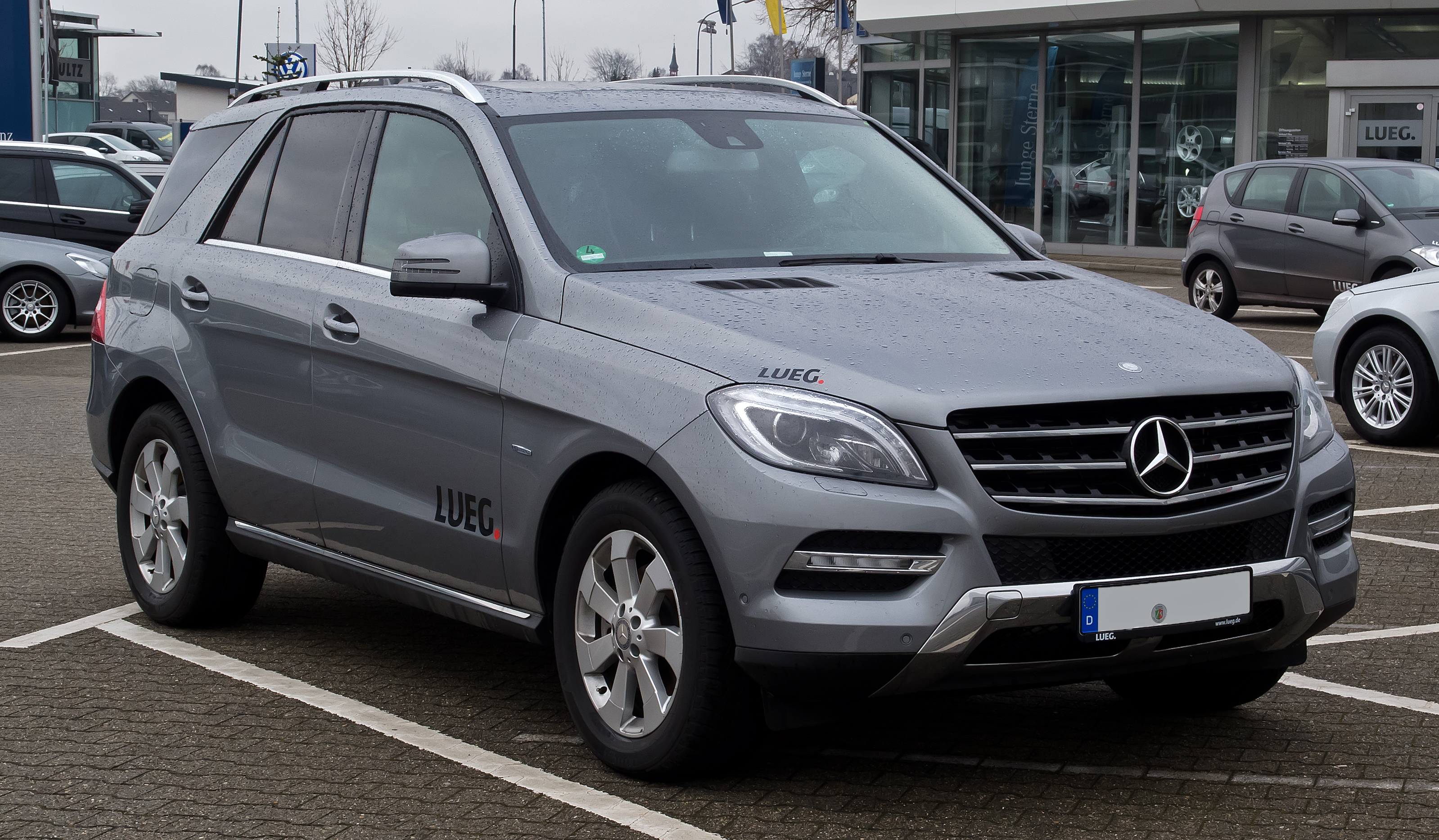 Mercedes-Benz ML 250 BlueTEC (W 166)